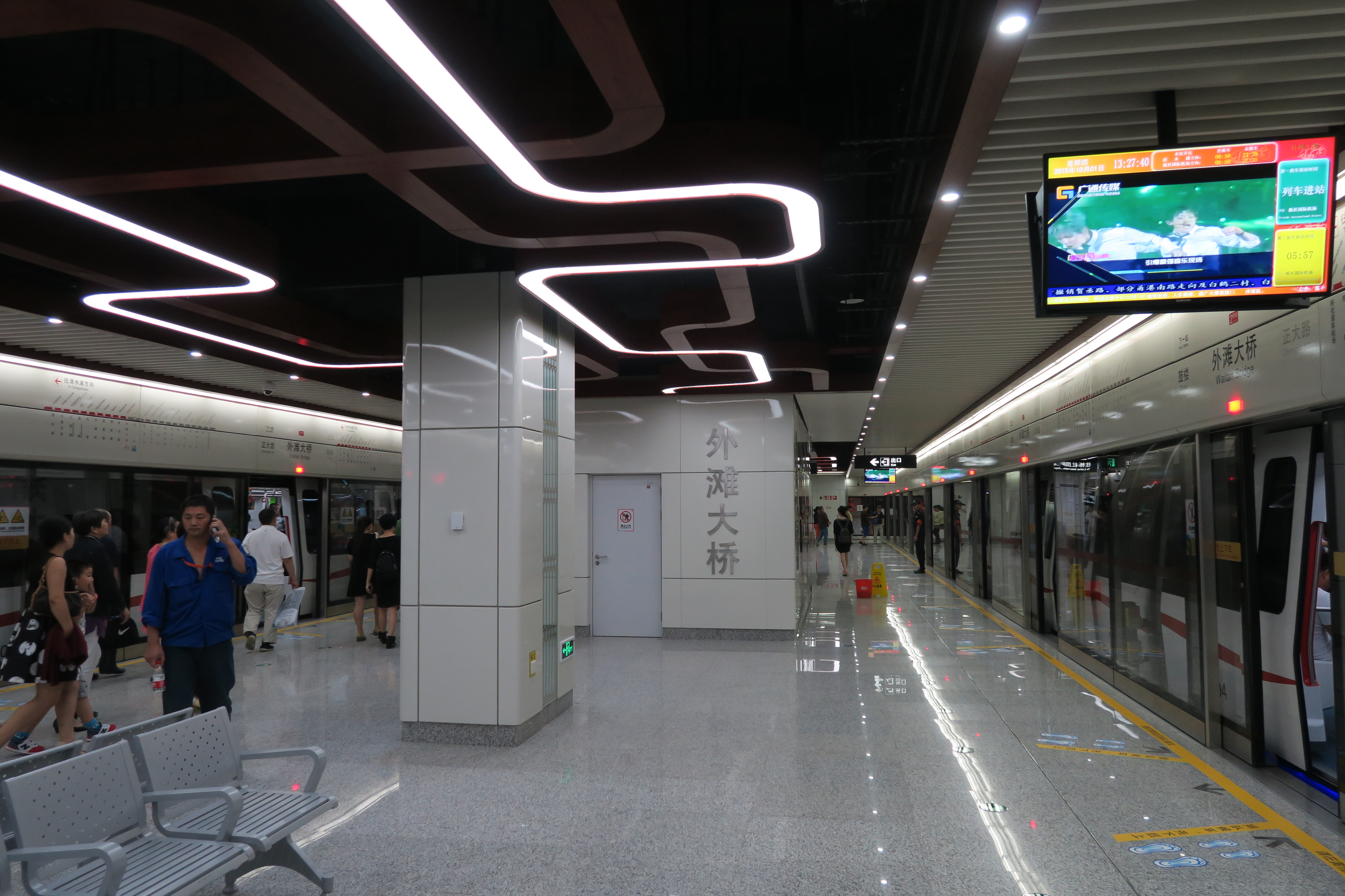 宁波轨道交通2号线外滩大桥站